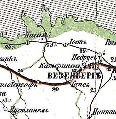 Вырезка из Почтовой карты Европейской России издания Ильина 1871 года - участок железной дороги Санкт-Петербург - Ревель близ Везенберга